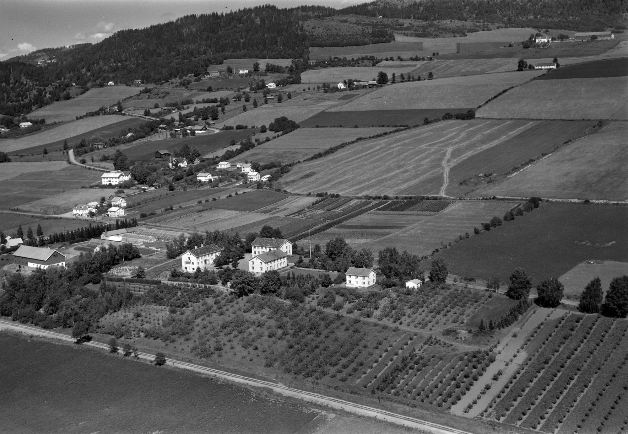 Flyfoto over skolen 1956